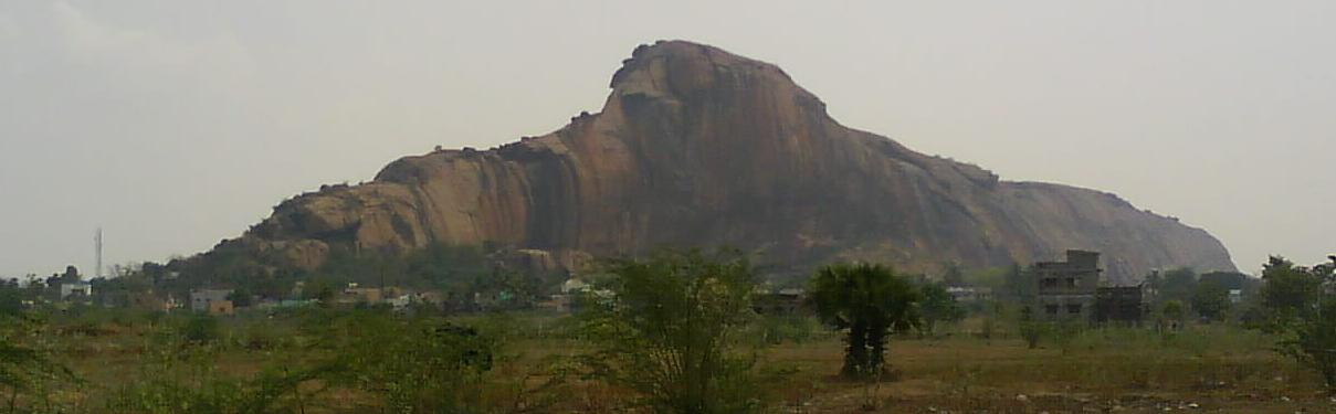 யனைமலையின் தோற்றம்